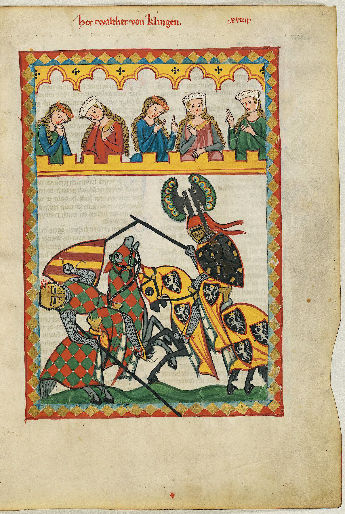 Codex Manesse, UB Heidelberg, Cod. Pal. germ. 848, fol. 52r: Walther von Klingen